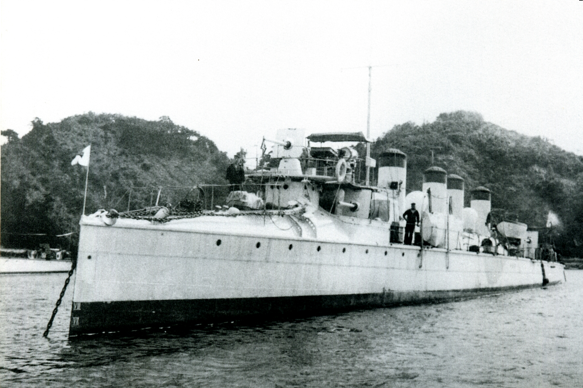 Japanese destroyer Sazanami at Yokosuka, 1901